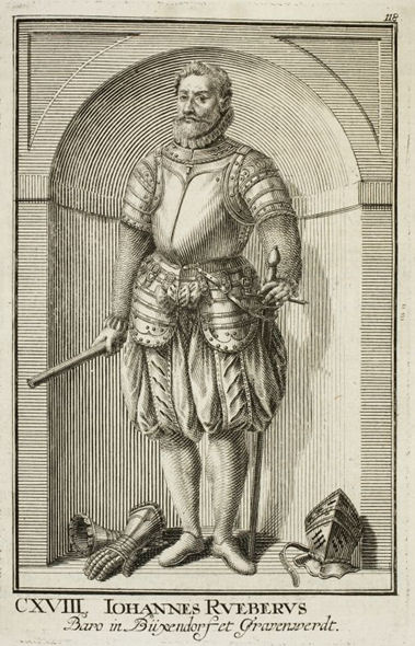 Hans Rueber zu Pixendorf und Grafenwörth (1529-1584), kaiserlicher Feldoberst und österreichisch-ungarischer General